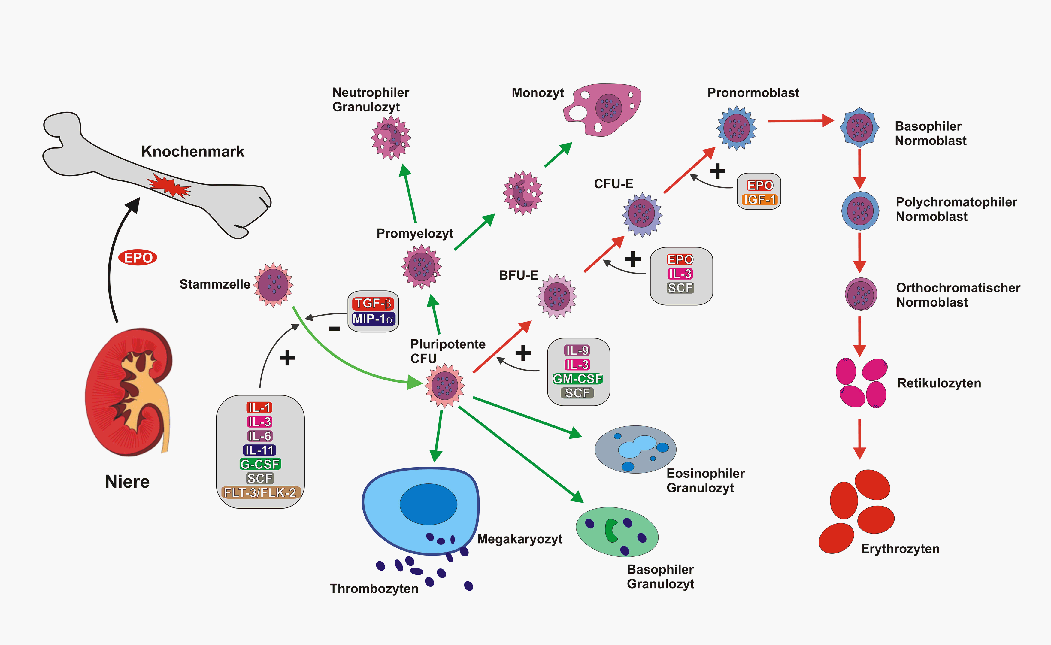 Angriffspunkte von EPO während der Hämatopoese/Erythropoese